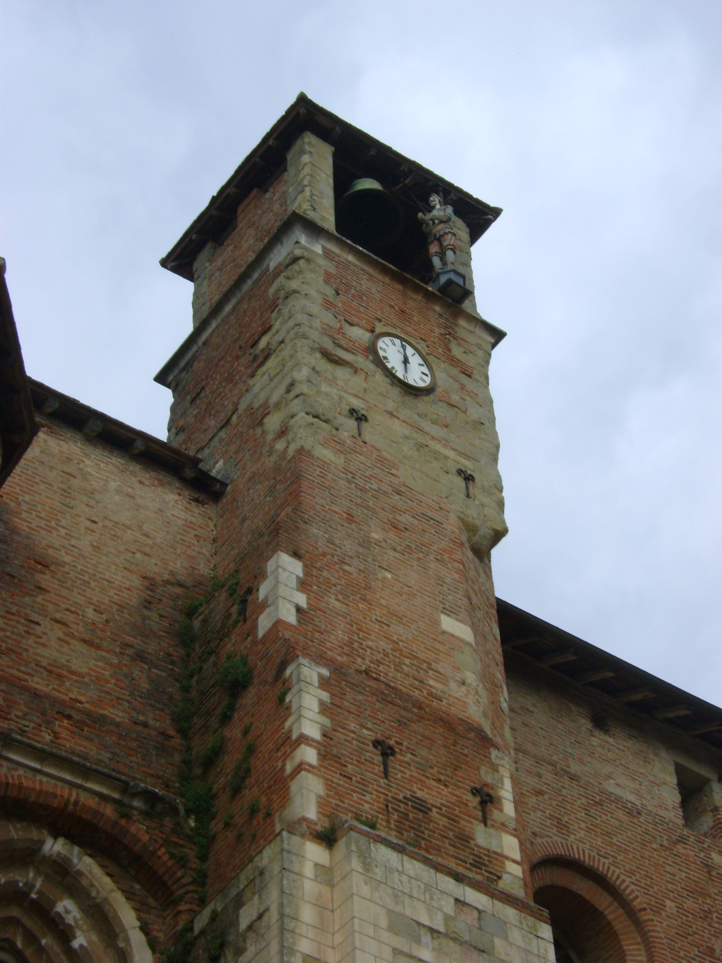 Cathédrale Saint-Alain de Lavaur, Tarn. .